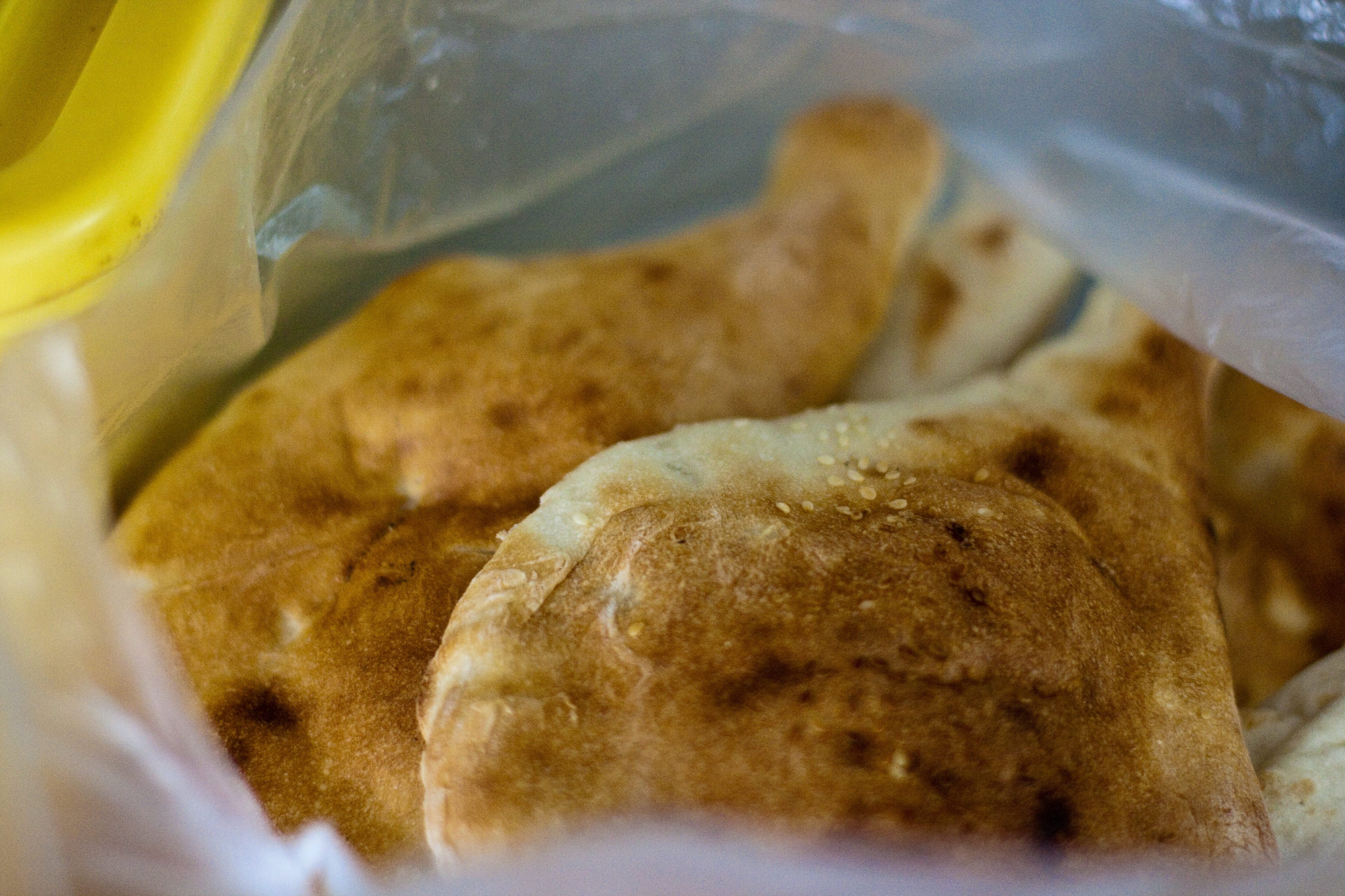 samoon bread